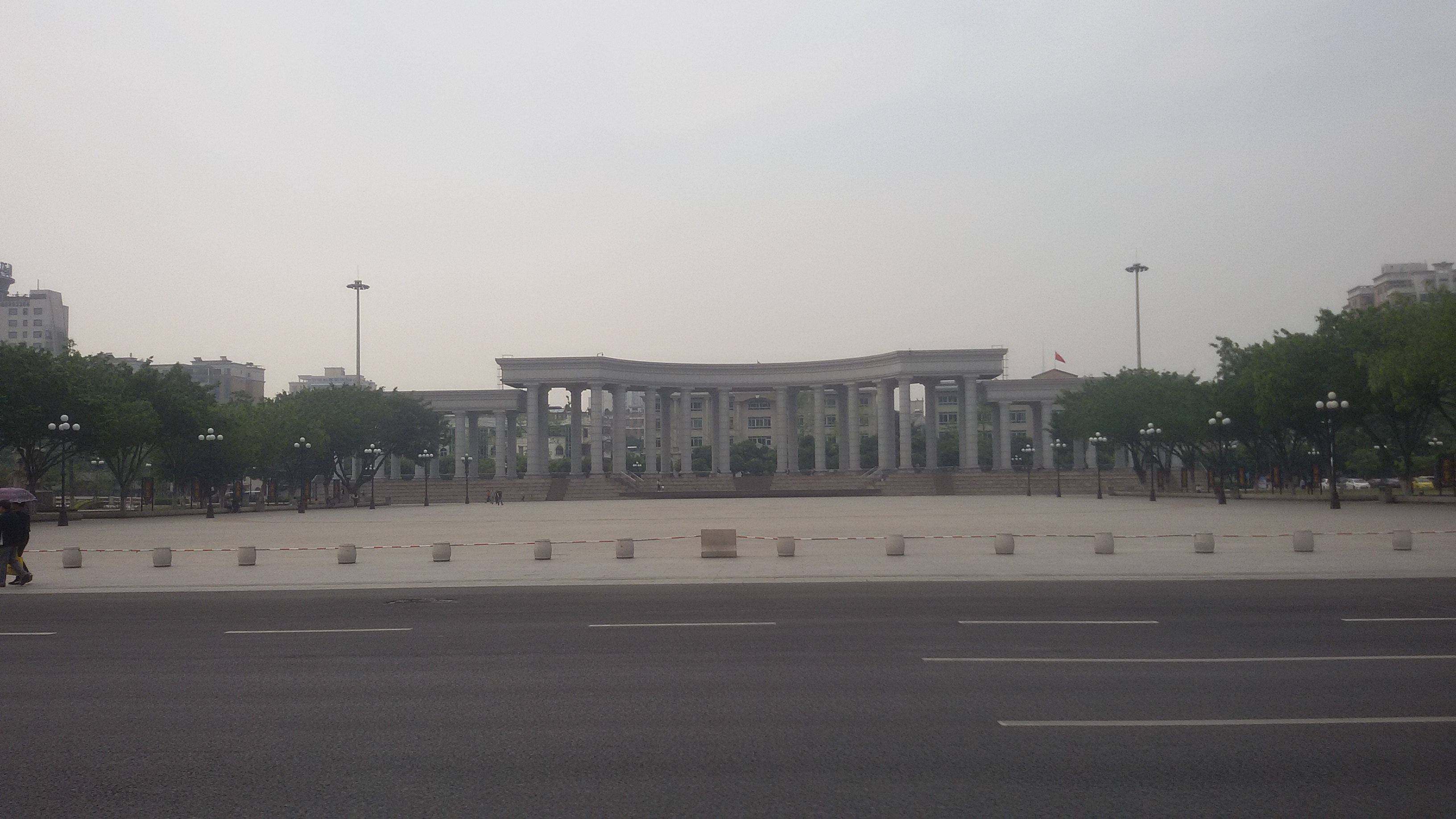 粵語: 花都區人民廣場